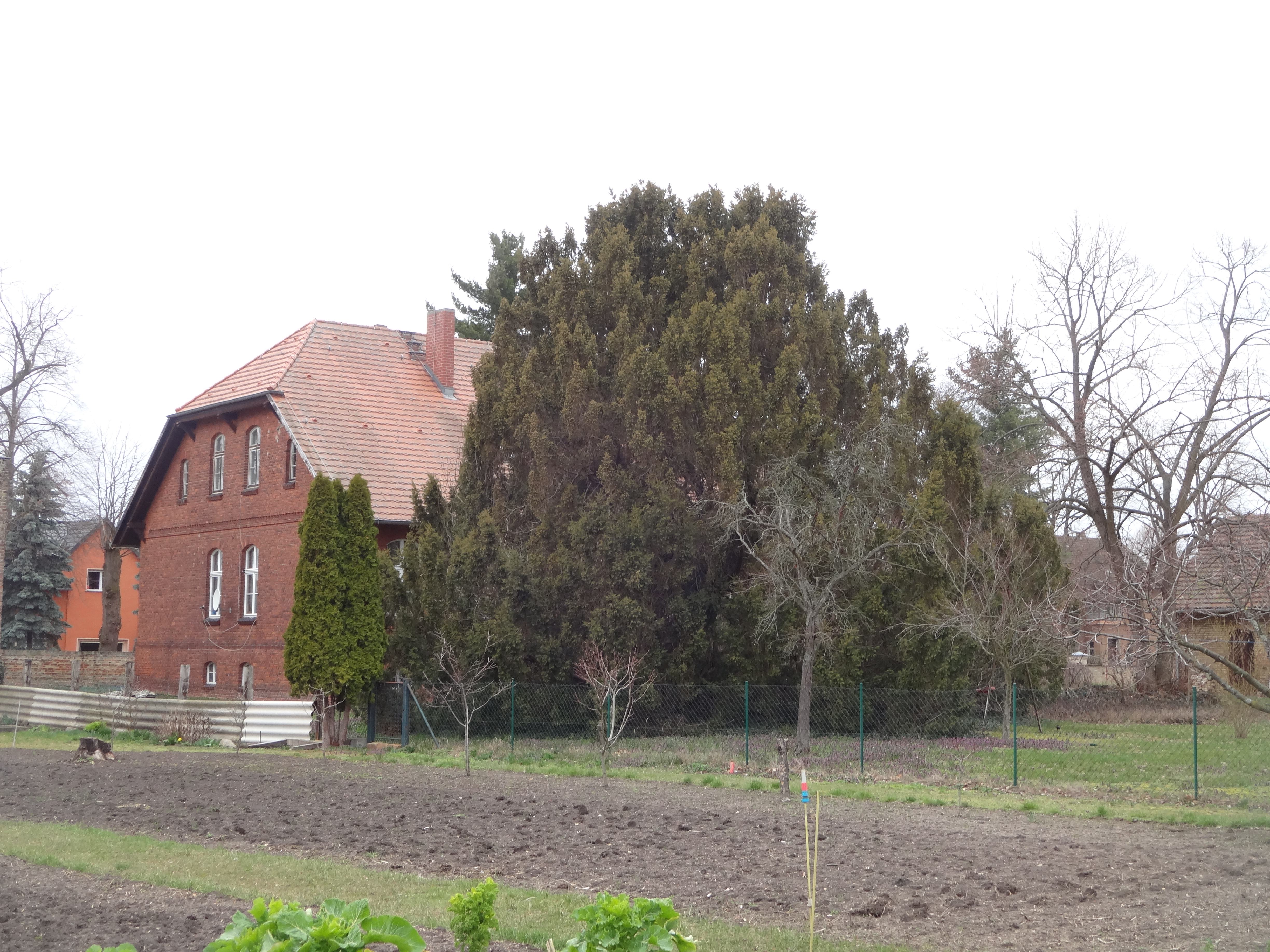 als Naturdenkmal geschützte Eibe im Pfarrgarten Netzen